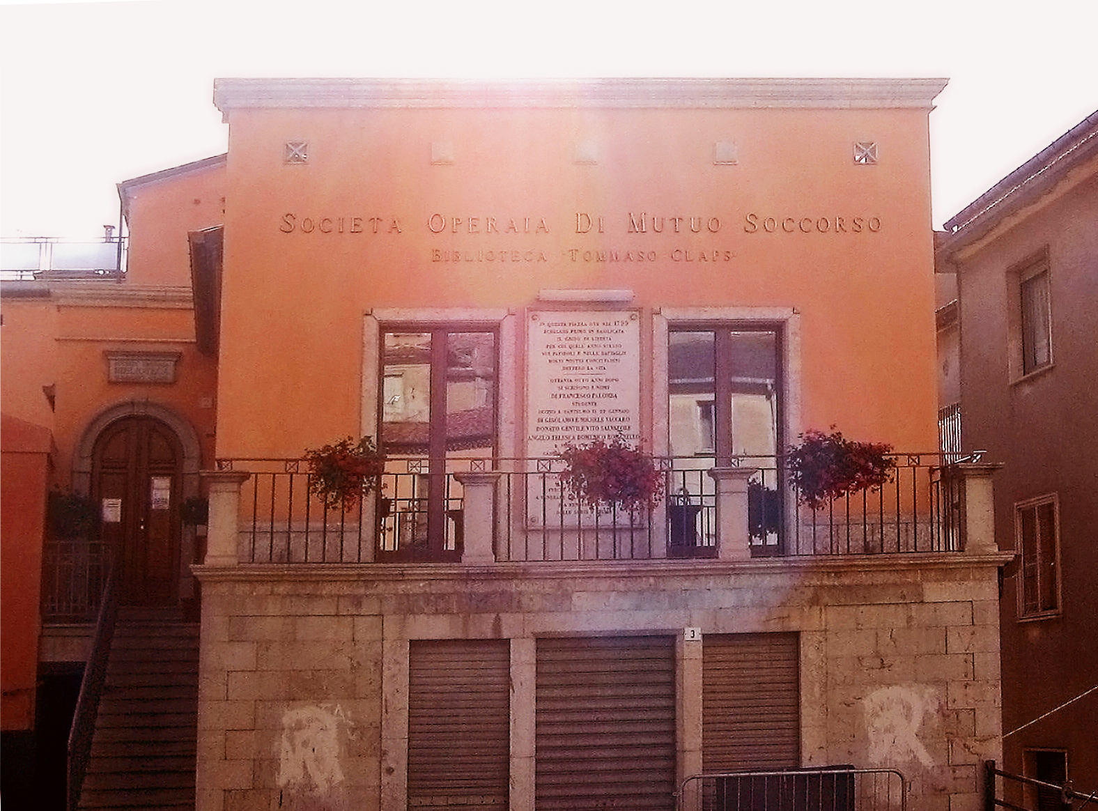 Sede della biblioteca